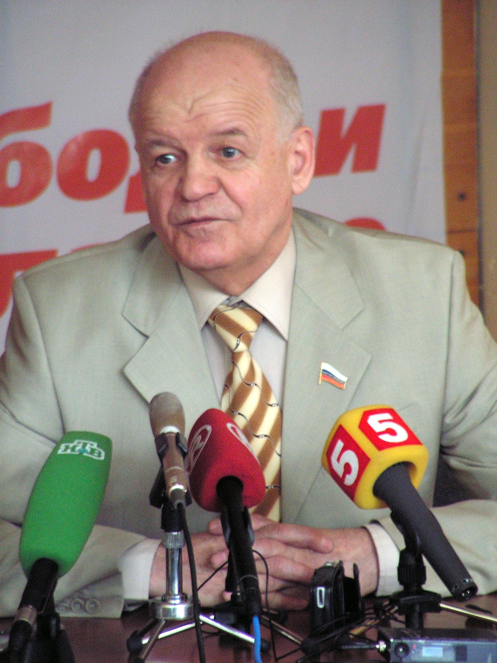 Виктор Иванович Черепков